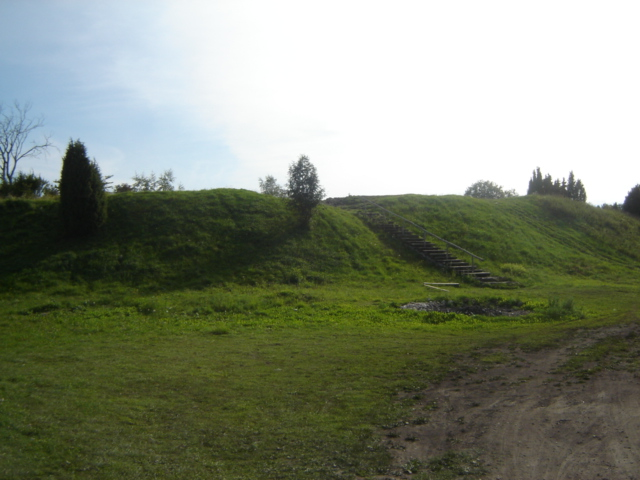 Valjala maalinna kõrged nõlvad.